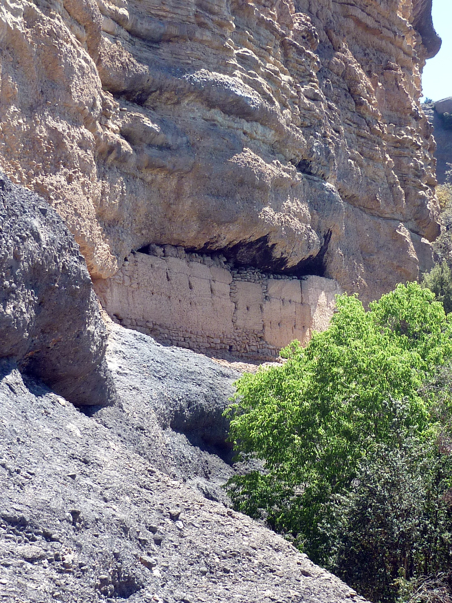 Casa del Corb, al peu de la Roca del Corb (Peramola - Alt Urgell) This is a a photo of a natural area in Catalonia, Spain, with id: ES510175